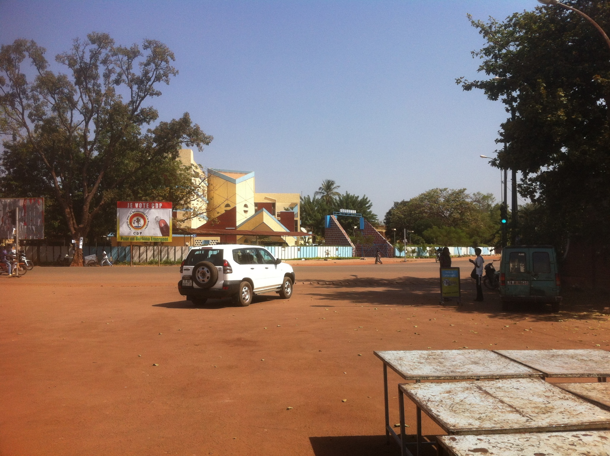 Hotel Somketa de Bobo-Dioualasso